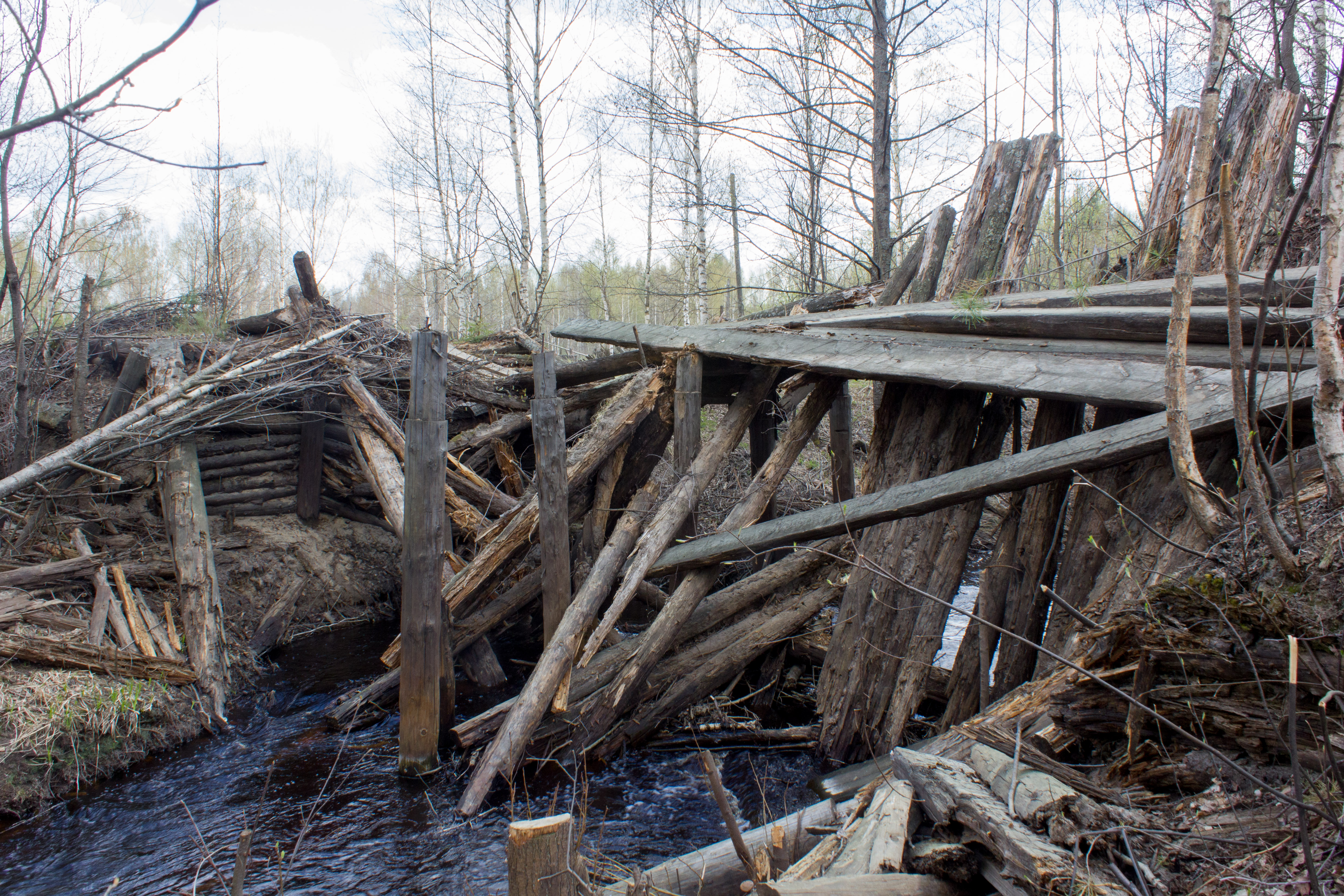 Разрушенный мост